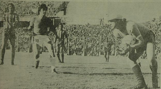 Partido del 18 de mayo de 1975, Rosario Central 0-Colón 0. El arquero centralista Carlos Biasutto toma la pelota ante el embate del delantero de Colón José Luis Saldaño. A la izquierda de la imagen aparece Eduardo García.